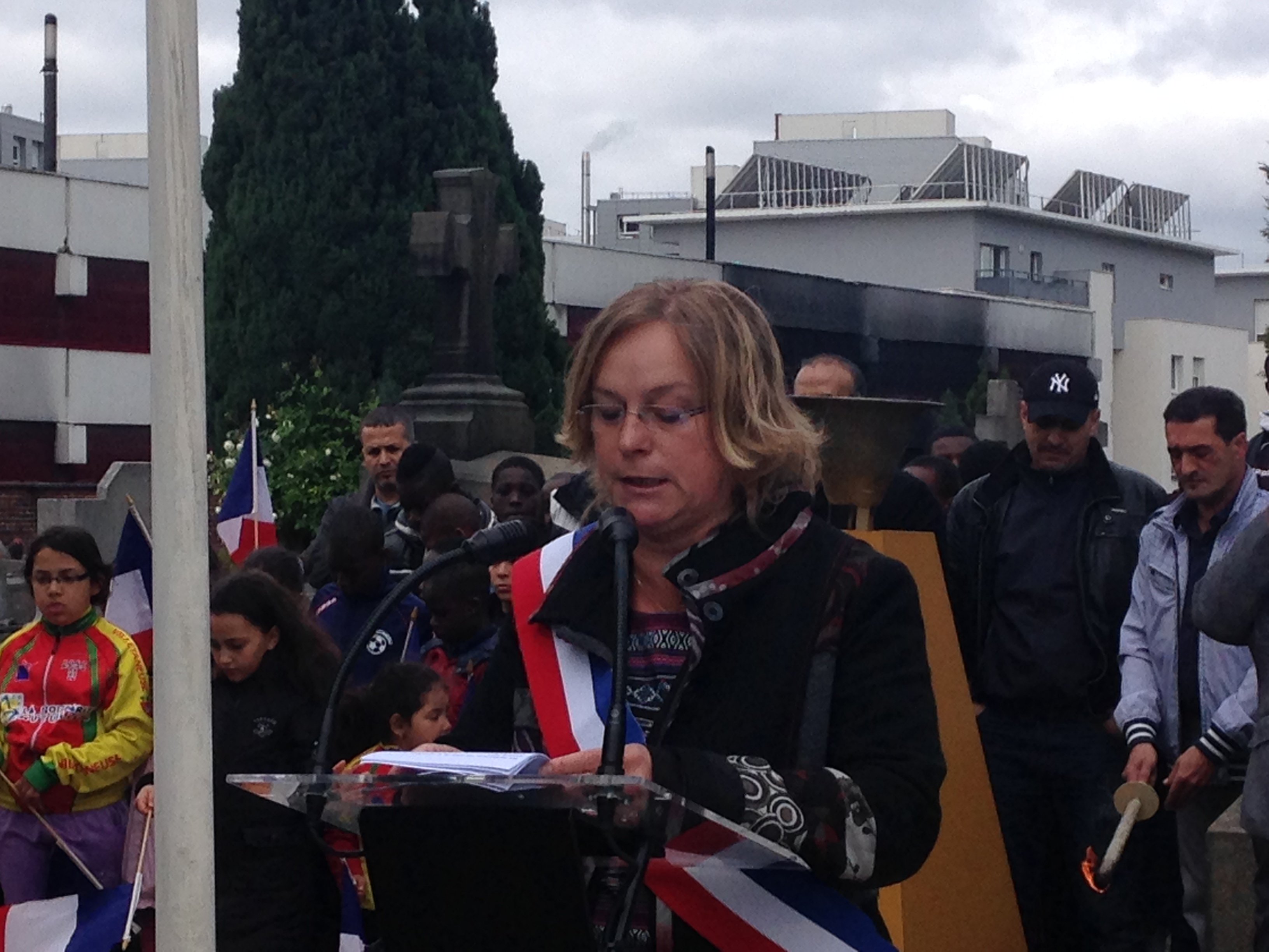 Carinne Juste, maire de Villetaneuse (Seine-Saint-Denis) le 8 mai 2014